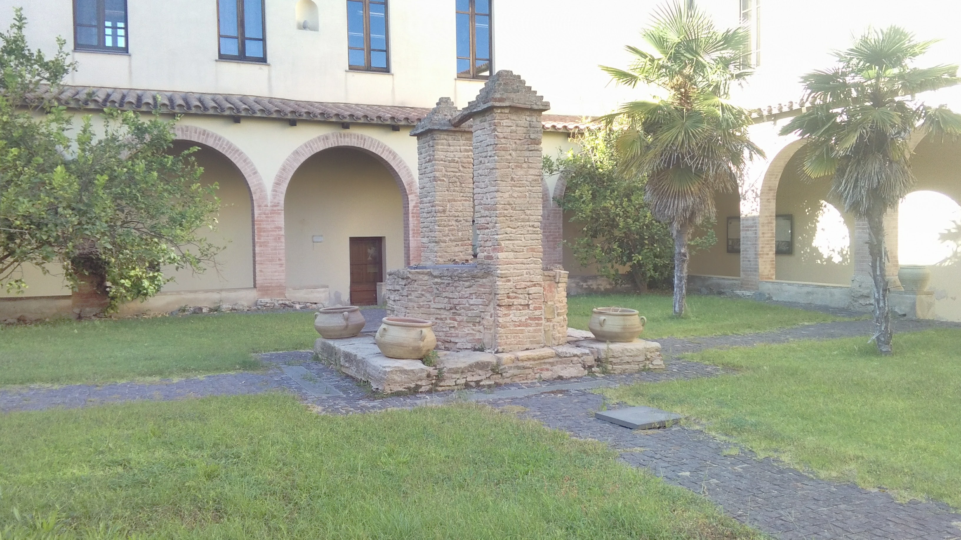 Il chiostro dell'ex Convendo dei Cappuccini di Sant'Antioco Villasor